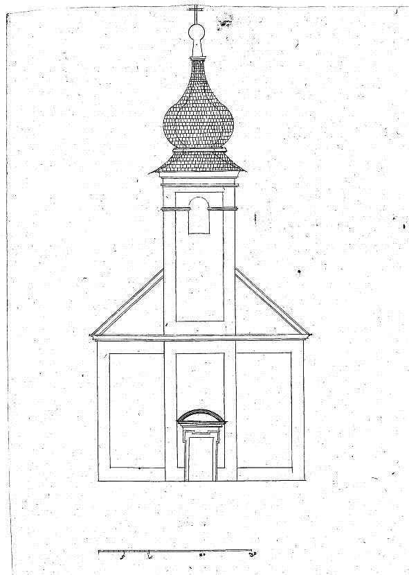 Form des Turmes im 18. Jahrhundert (ab 1707 oder 1764), bis 1783